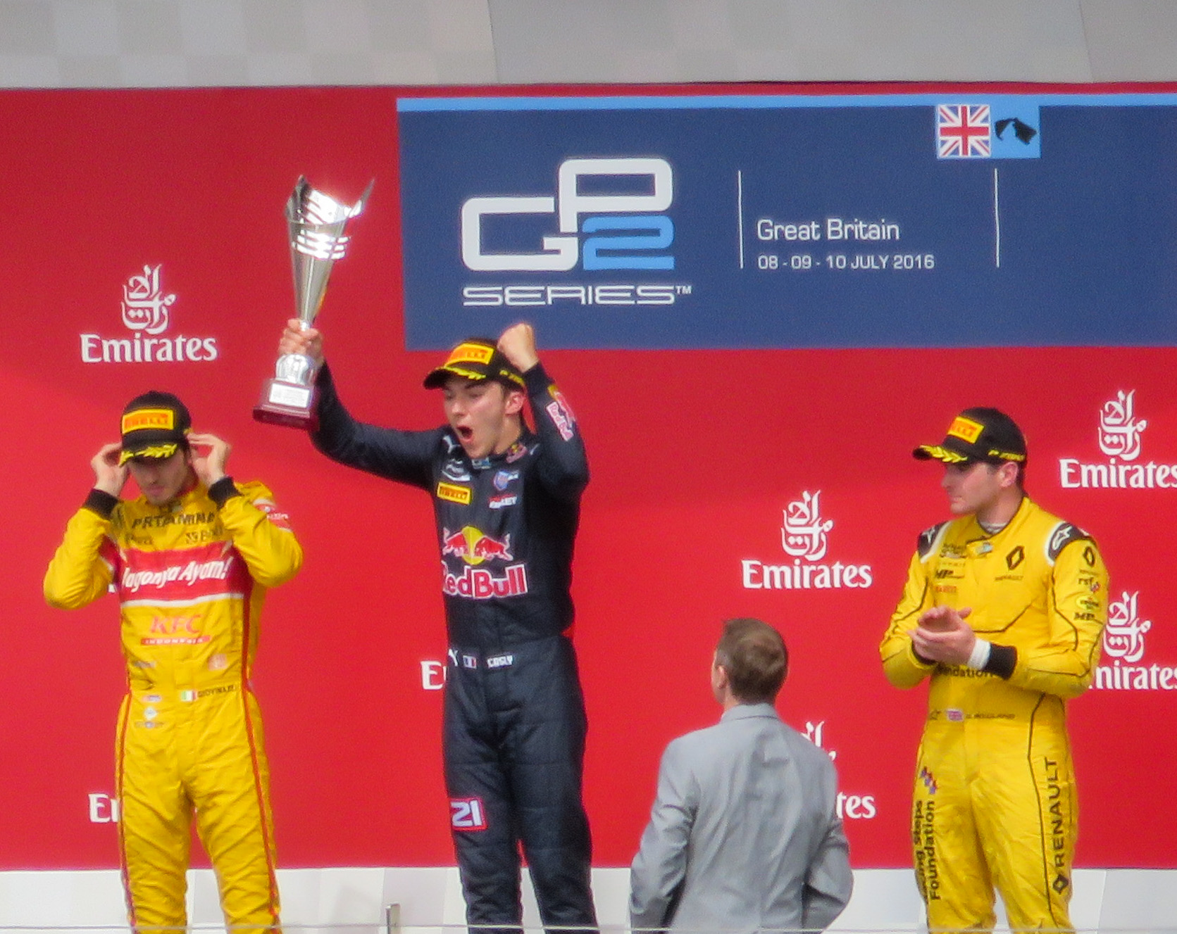 Photographie du podium de la course principale de la manche de Silverstone en GP2 Series en 2016. De gauche à droite : Antonio Giovinazzi (deuxième de la course) ; Pierre Gasly (vainqueur) ; Oliver Rowland (troisième).